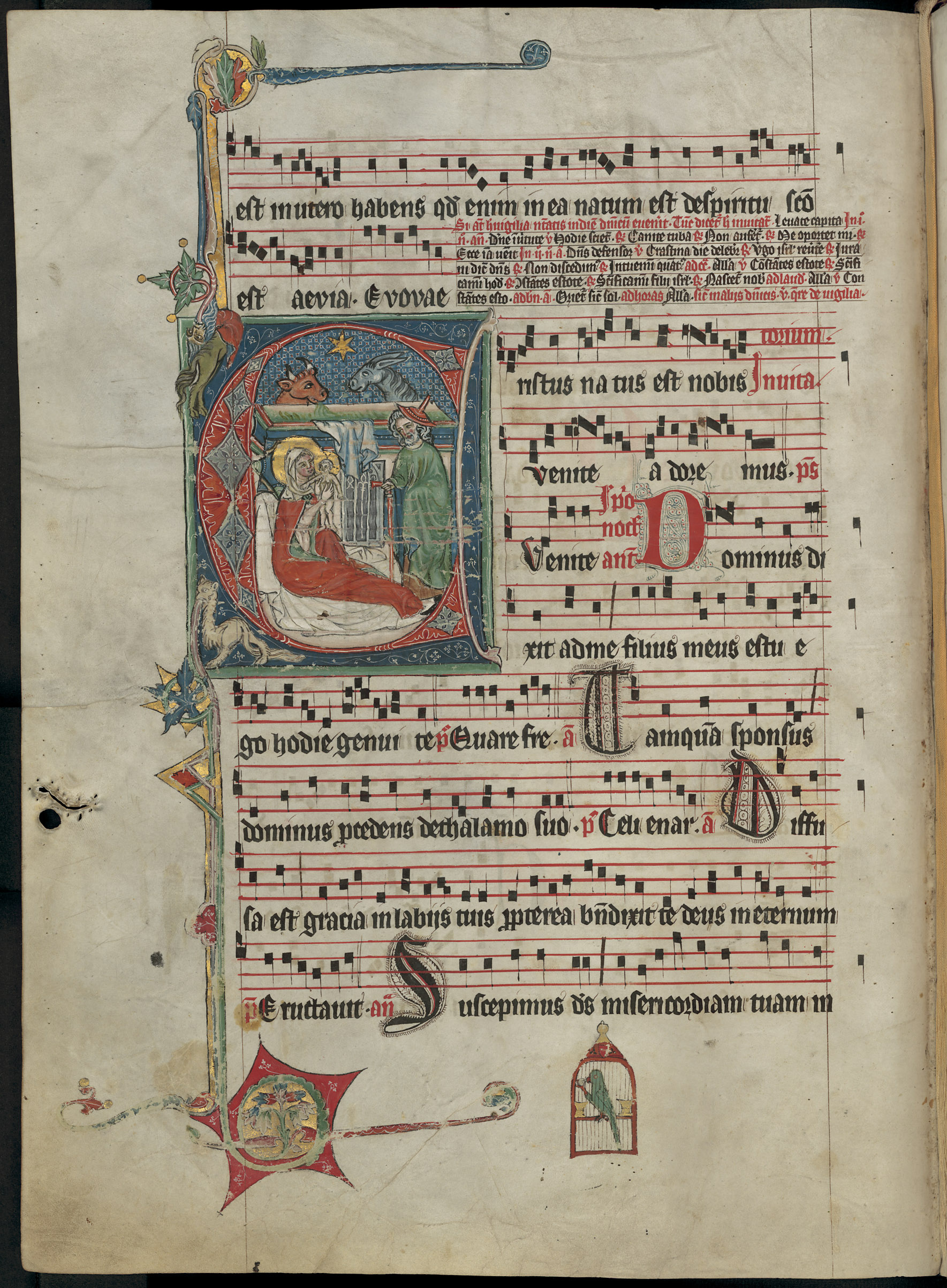 Antifonář Elišky Rejčky zhotovený pro ženský cisterciácký klášter na Starém Brně, R 600, fol. 27v